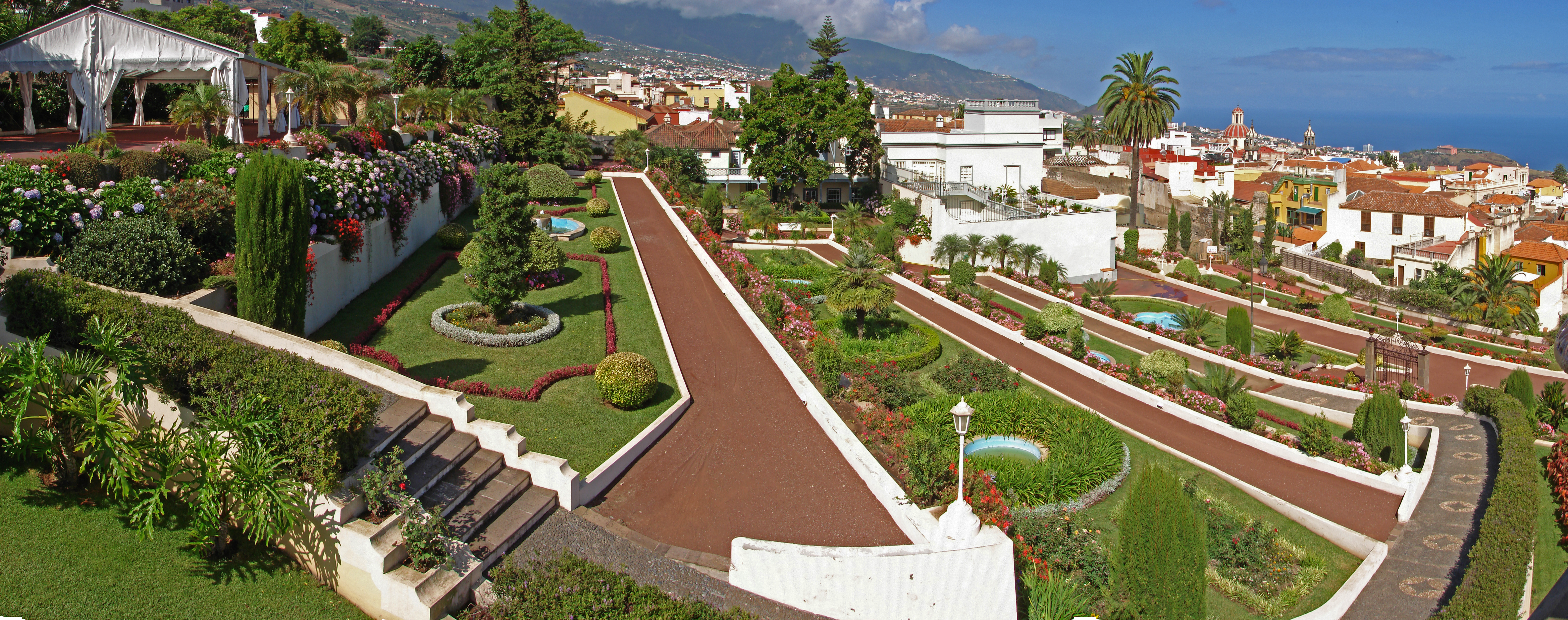 Jardines del Marquesado de la Quinta Roja, Blick auf die westlichen Terassen